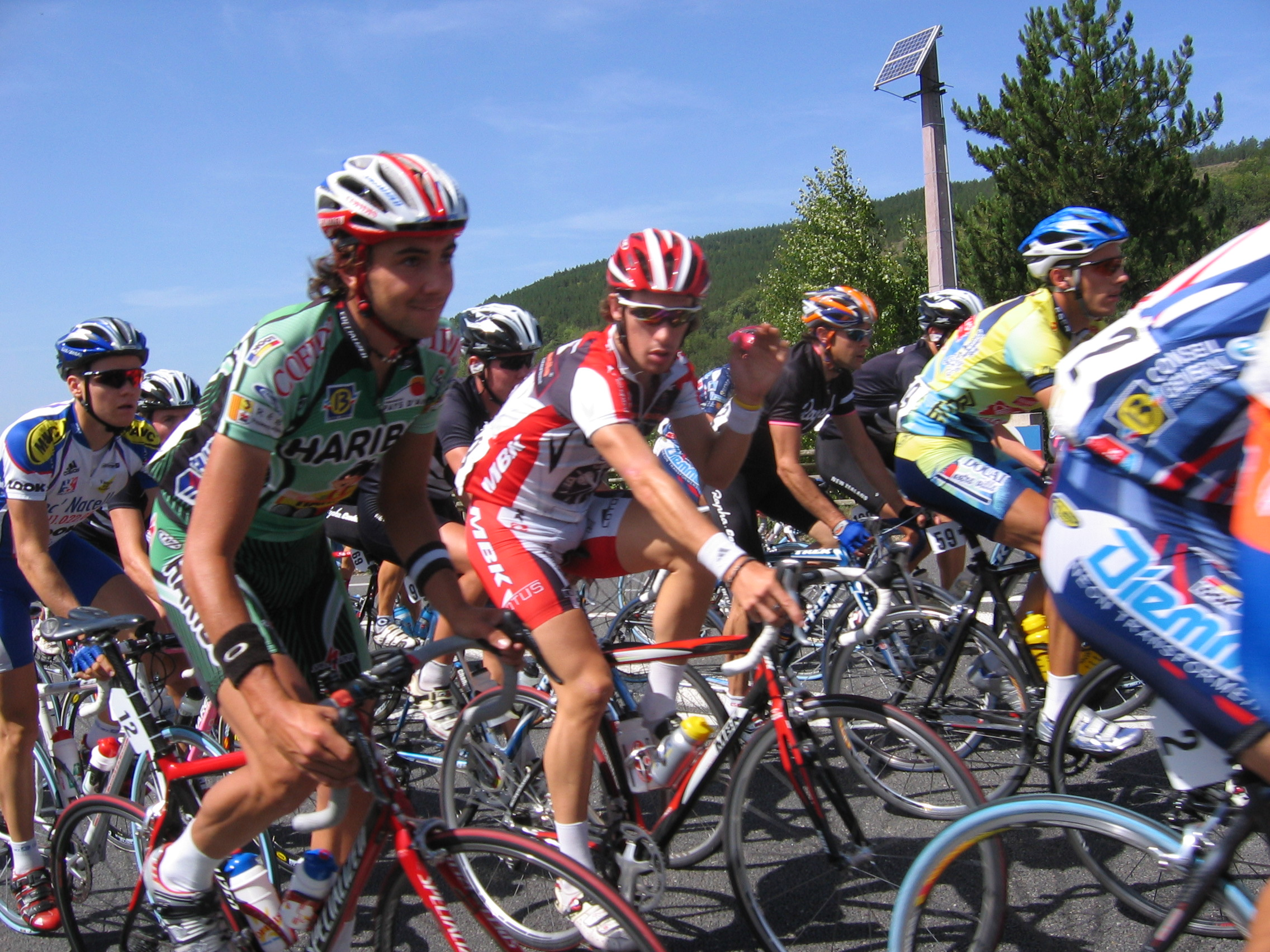 Le peloton du Tour du Gévaudan 2006 lors de la 1ere étape entre Mende et Saugues. Photo prise personellement (Sanguinez) à Badaroux dans le col de la Tourette. Sur la photo : Au premier plan, Colin Menc-Molina (AVC Aix-en-Provence), au milieu, Romain Lebreton (Lotus-MBK U.C. Sud-Lubéron) This is a personnal picture take during the 1st stage of the 2006' Tour du Gévaudan